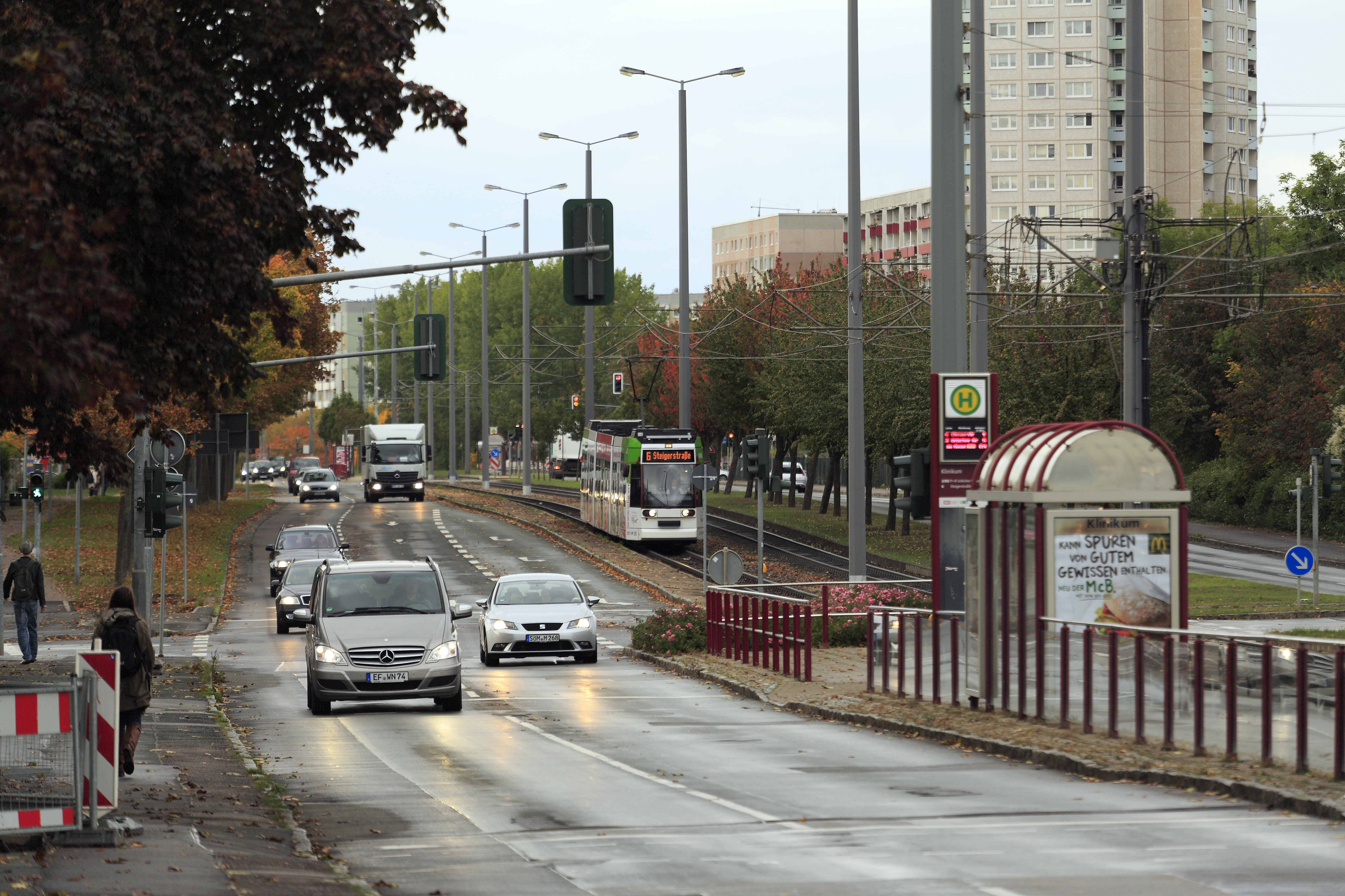 Vom Straßenbahn-Bw stadtauswärts, der Zug der Linie 6 zur Steigerstraße befindet sich kurz vor der Haltestelle Klinikum.